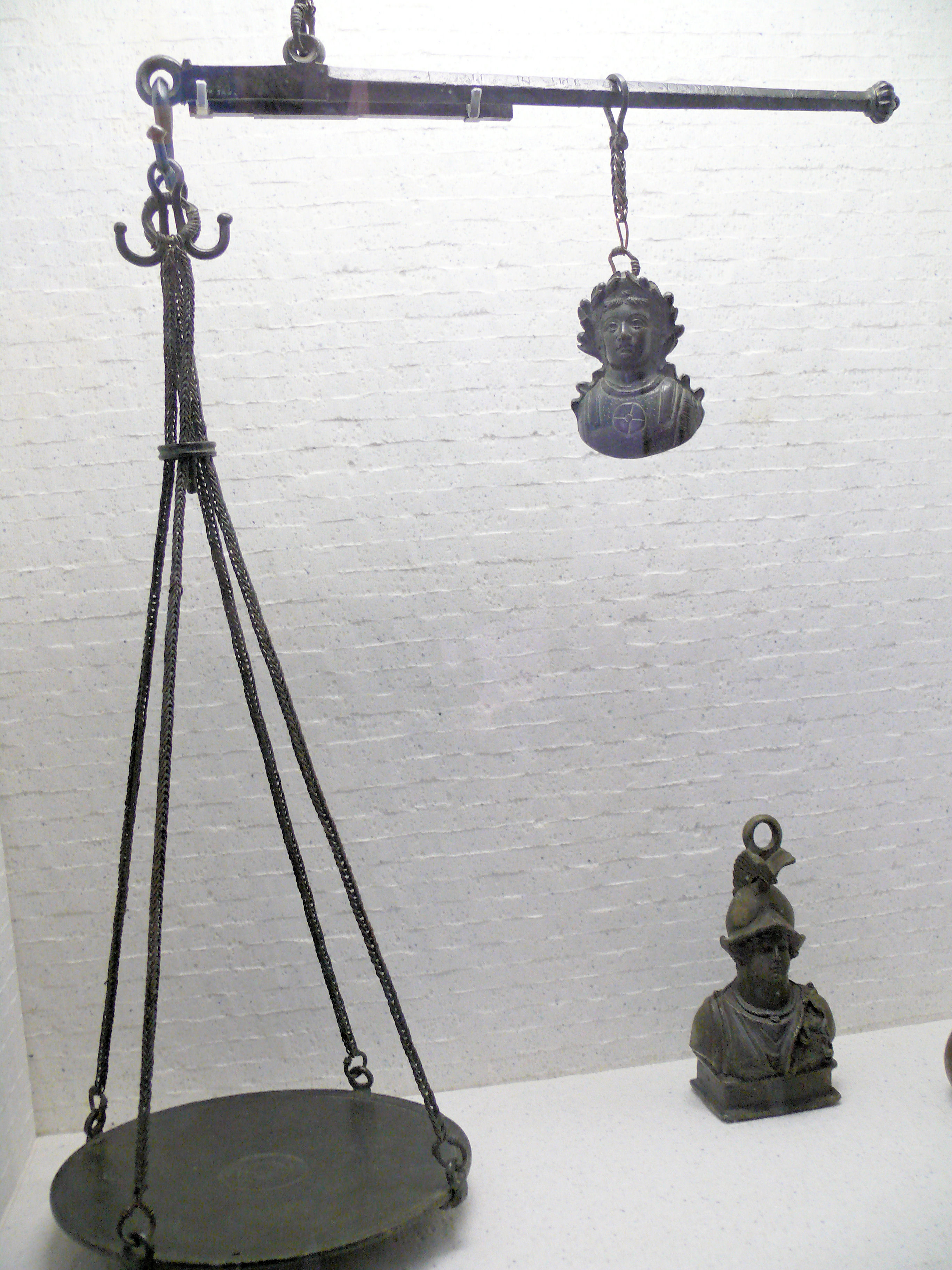 Palais du Louvre - Salle des bronzes antiques - Balance romaine